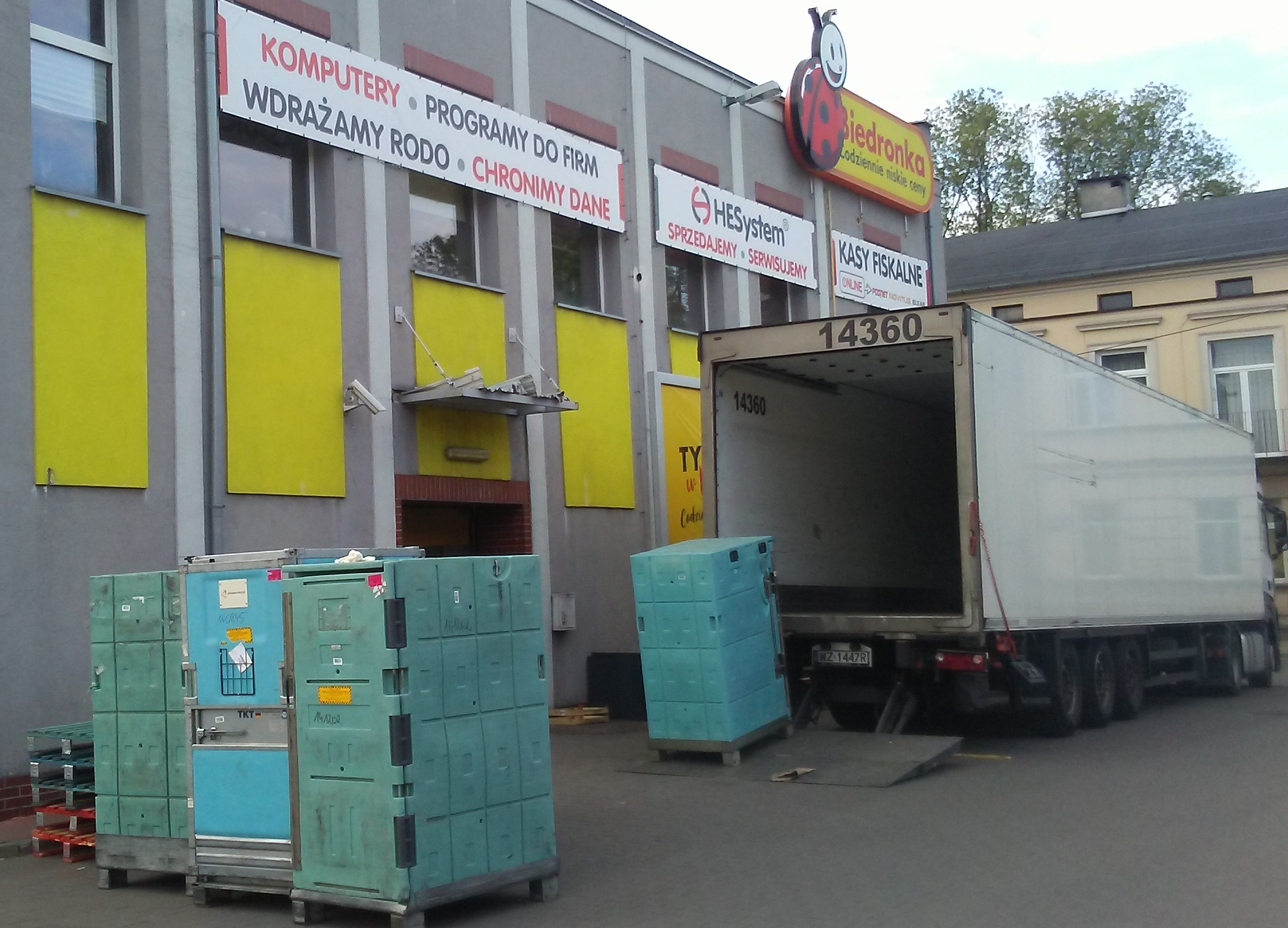 Dyskont Biedronka podczas przyjmowania zaopatrzenia. Tomaszów Mazowiecki, ul. Konstytucji 3 Maja 1791 roku